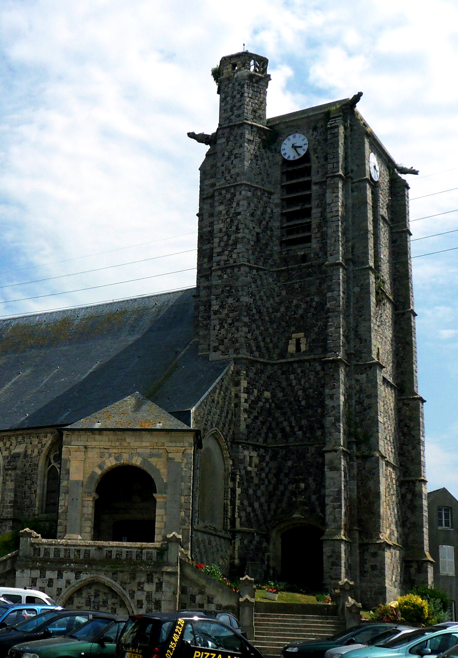 Ault (Somme, France). L'église St-Pierre.